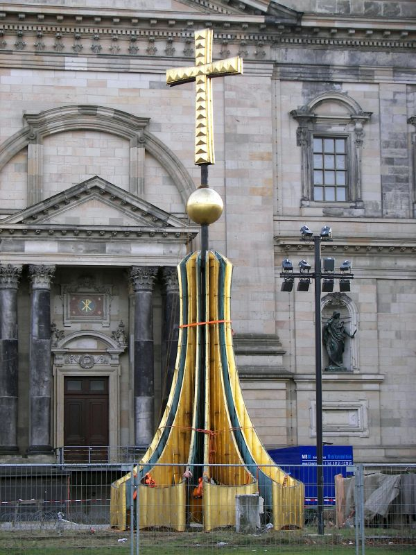 Berliner Dom Kuppelkreuz, Berlin, Germany